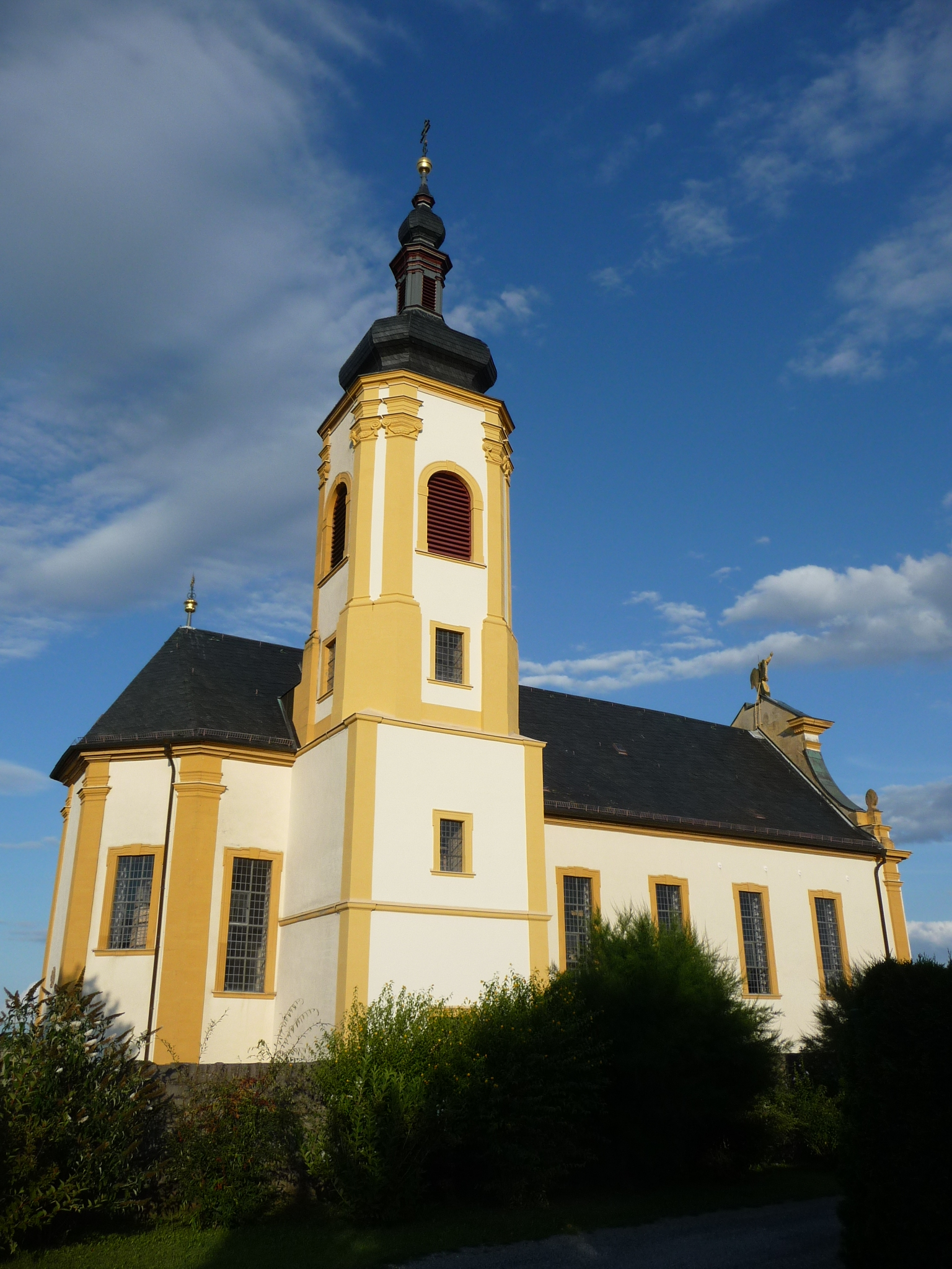 katholische Kirche Heiliger Schutzengel und Jakobus der Ältere in Gaukönigshofen, Unterfranken